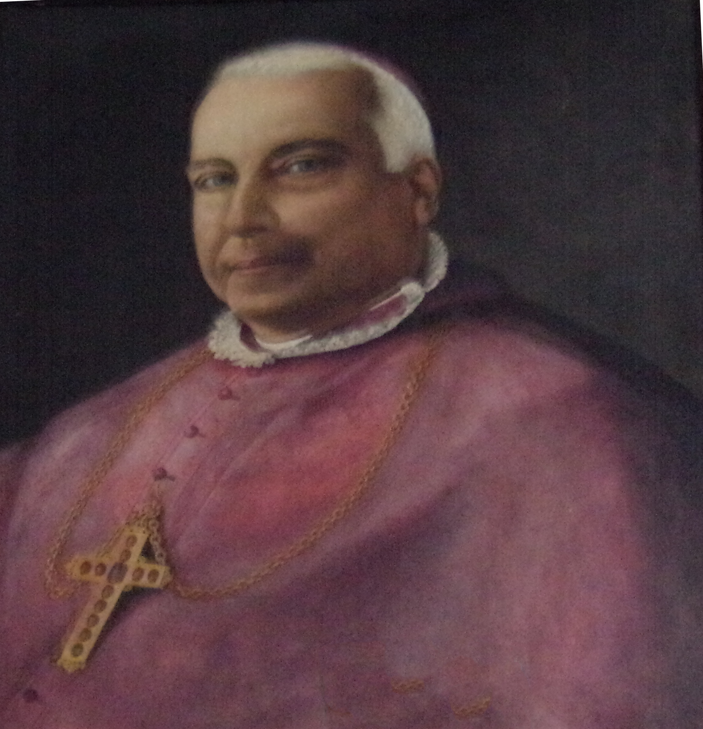 Cuadro del obispo Boneo de Santa Fe, donado por la Rev. Hna. Carmen Ferrea, franciscana.